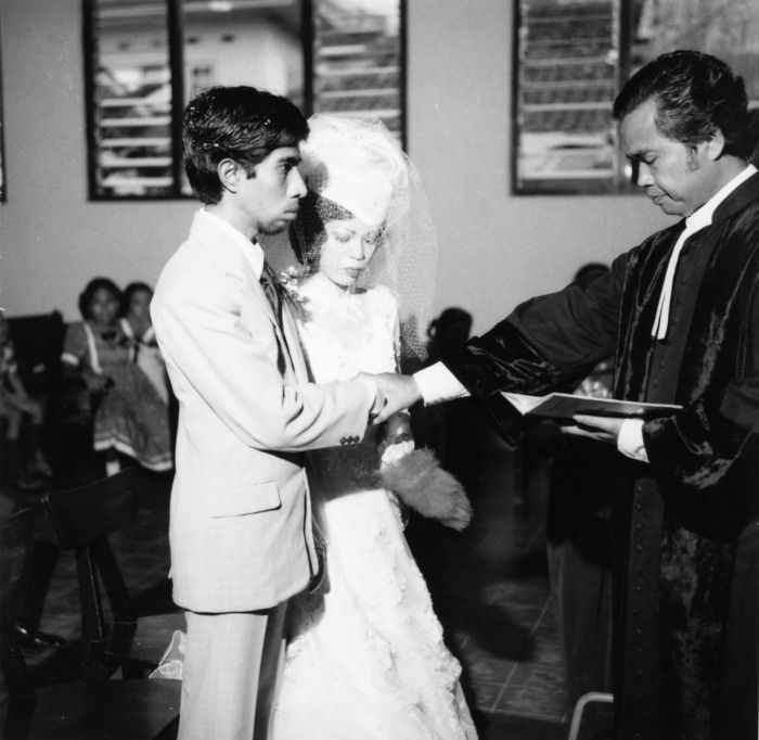 Negatief. Een dominee zegent een huwelijk in in de Bethaniakerk